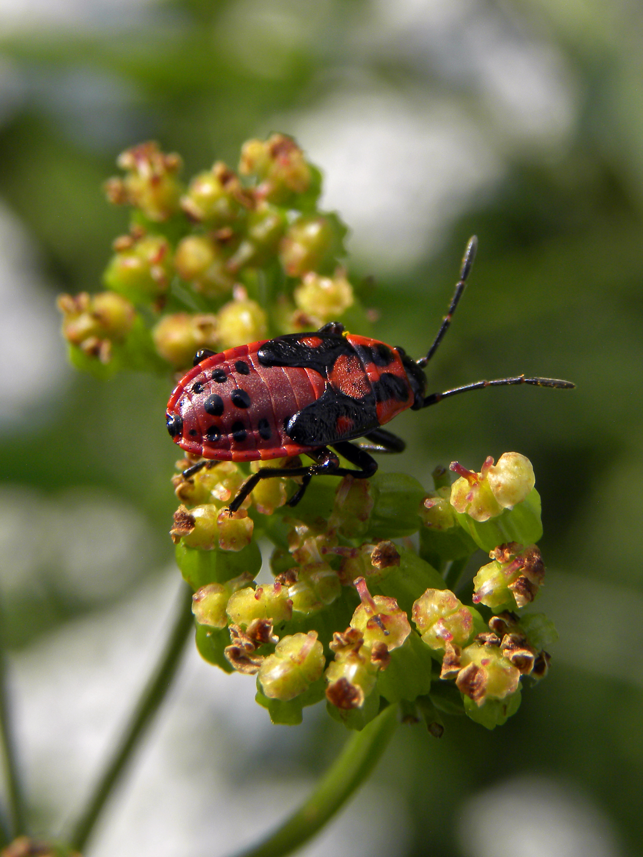 Nymphe eines Knappen (Spilostethus saxatilis)